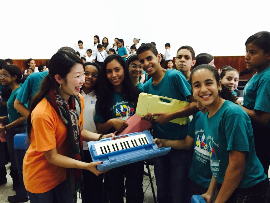 第87回クルーズの寄港地ラグアイラ（ベネズエラ）にて支援物資を届けている。